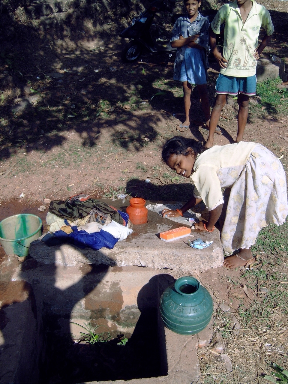 Eigen foto gemaakt in Goa India (2004)